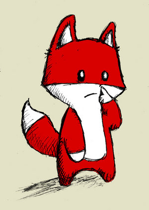 zorrito pyong